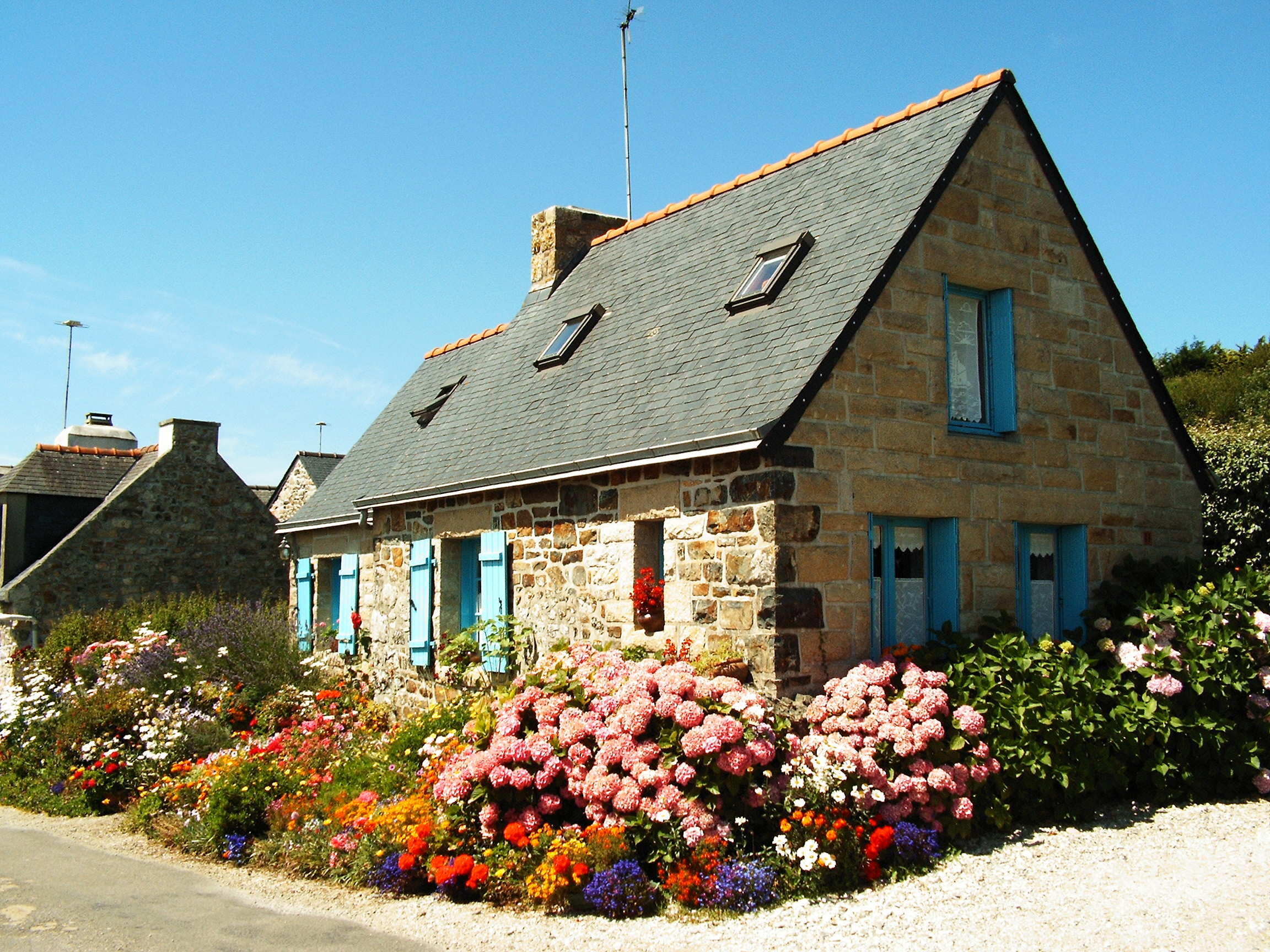 Bauernhaus auf der Halbinsel Crozon